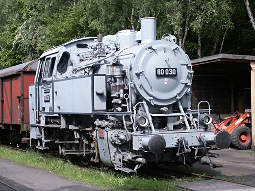 Dampflokomotive der Baureihe 80 mit rekonstruiertem Fotografieranstrich, Eisenbahnmuseum Bochum-Dahlhausen